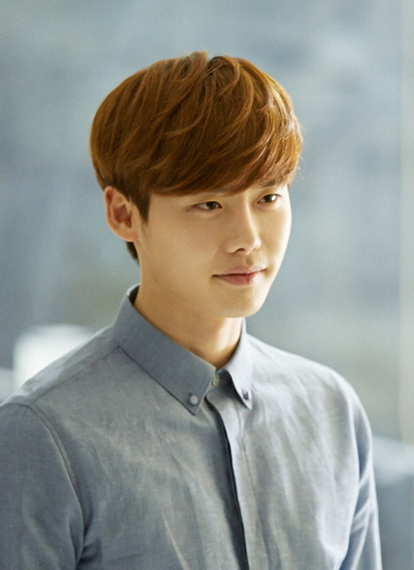 (이종석 x 엠비오) 웹드라마 Long Distance Love 고화질 현장사진